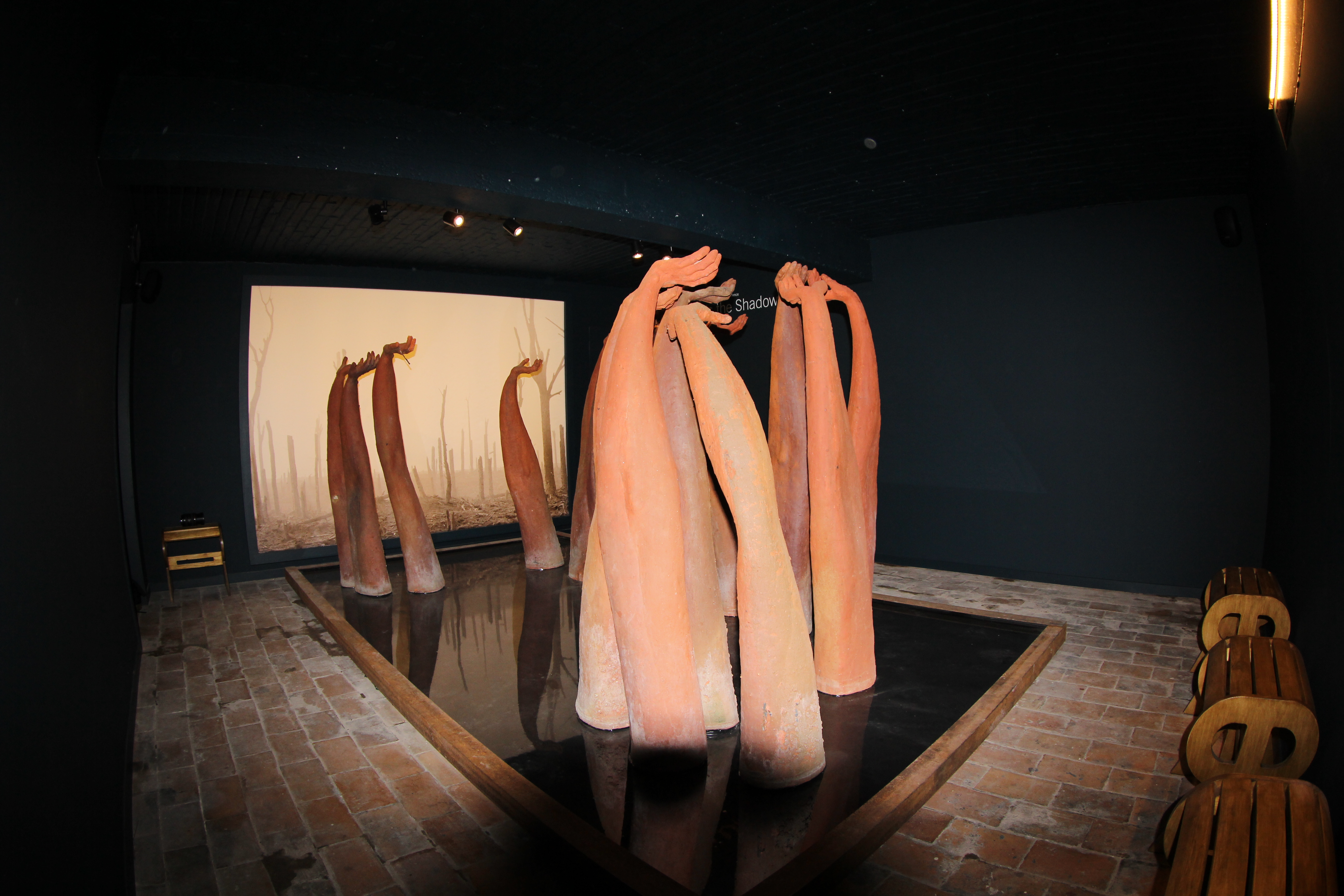 kunstwerk